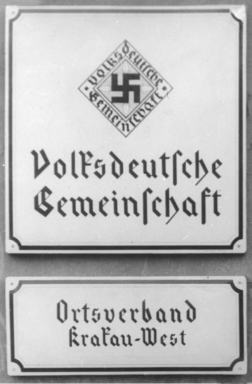 Tabliczka na budynku siedziby Związku Volksdeutschów, oddział Kraków-Zachód.